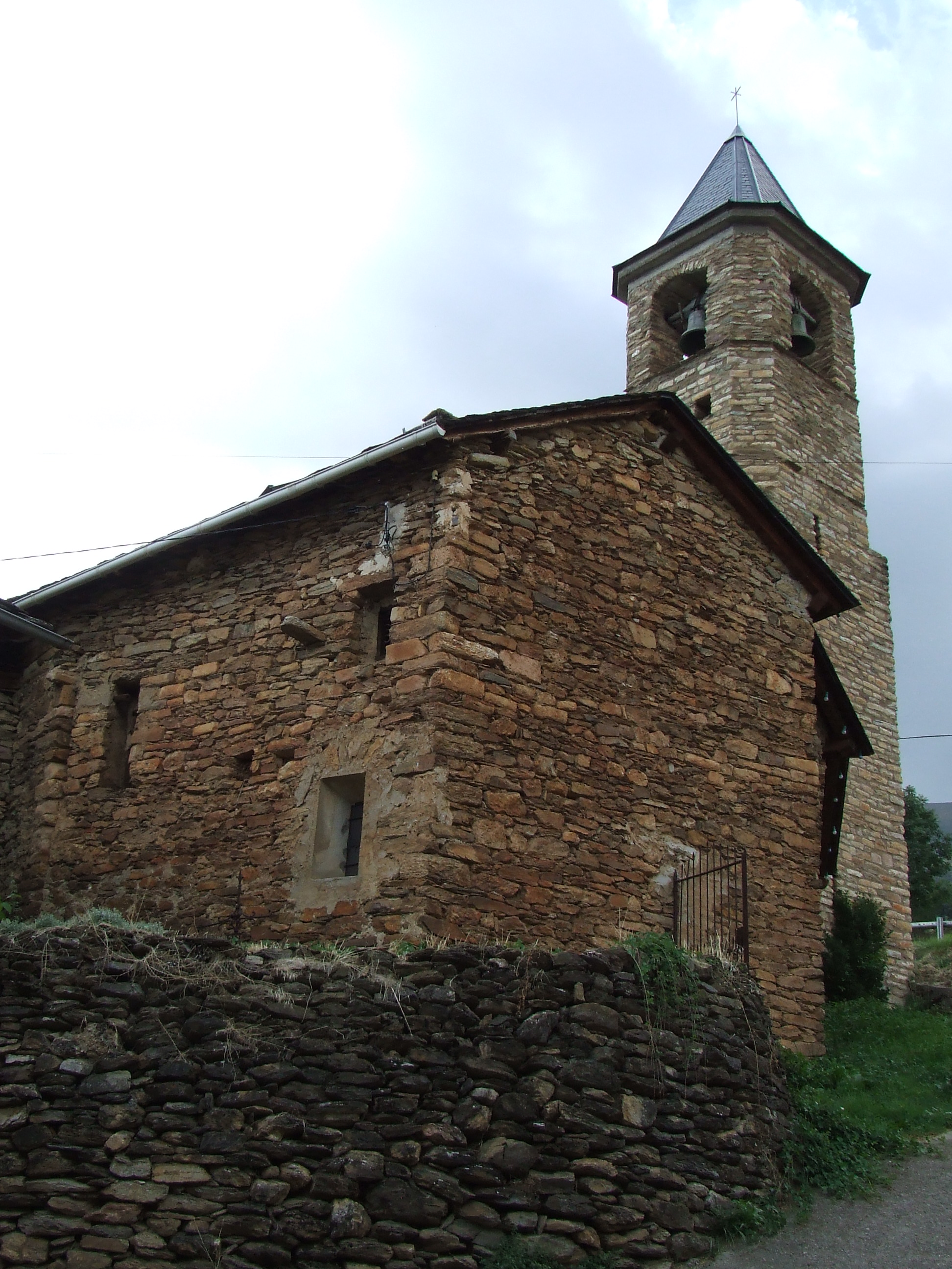 Sant Andreu d'Astell (la Torre de Cabdella, Pallars Jussà)